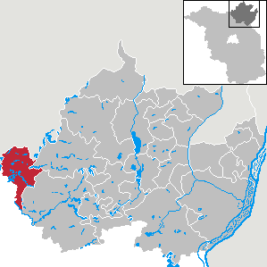 Lychen in Brandenburg (Country) - District Uckermark